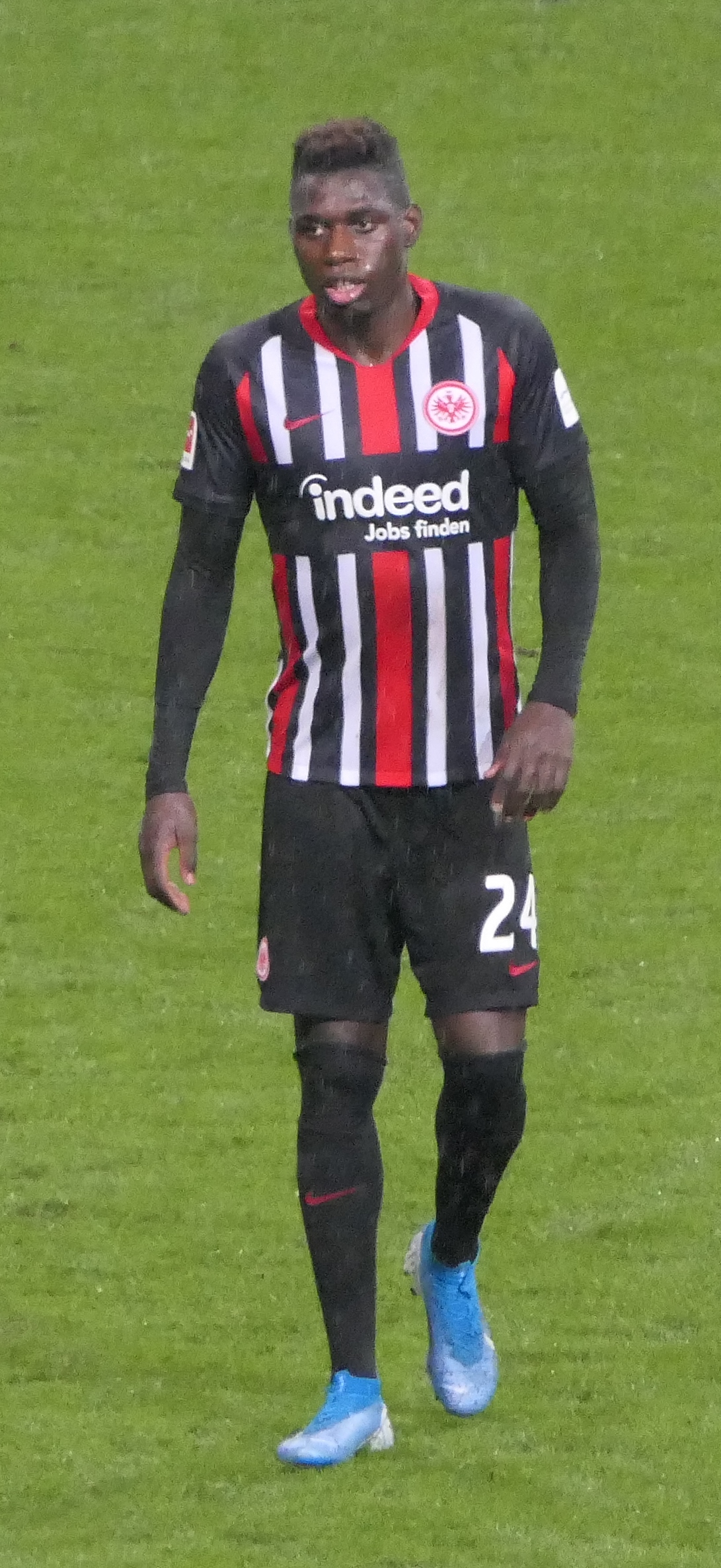 Der Fussballprofi Danny da Costa im Trikot von Eintracht Frankfurt beim Heimspiel gegen den SV Werder Bremen am 06.10.2019.